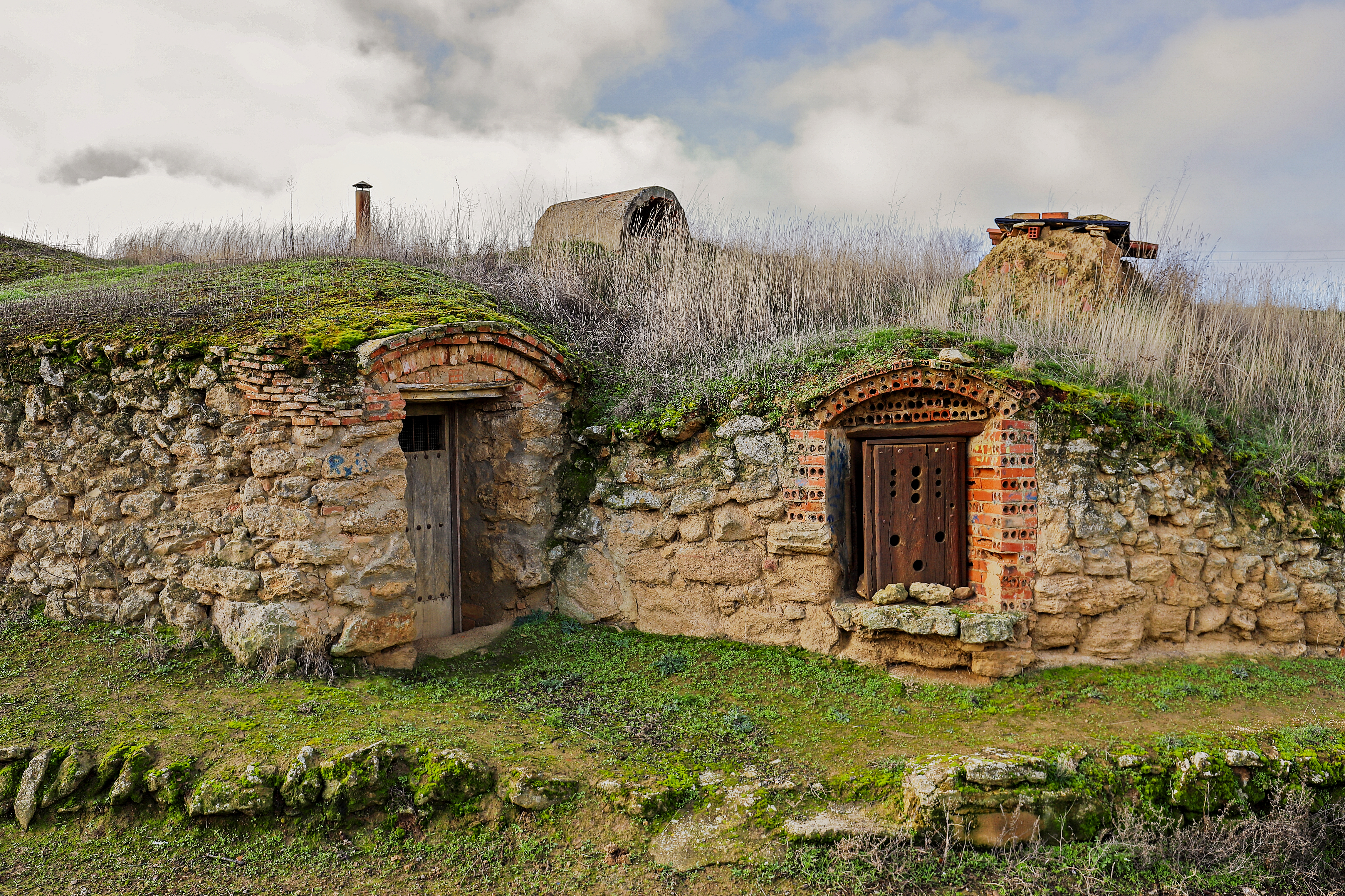 Fuentes de Ropel es un municipio de la comarca Benavente y Los Valles, provincia de Zamora.